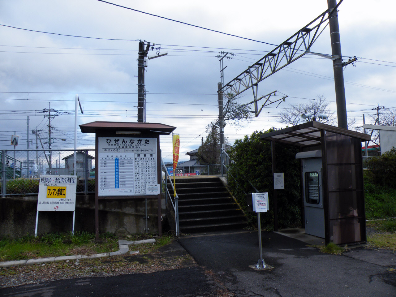 JR九州長崎本線肥前長田駅